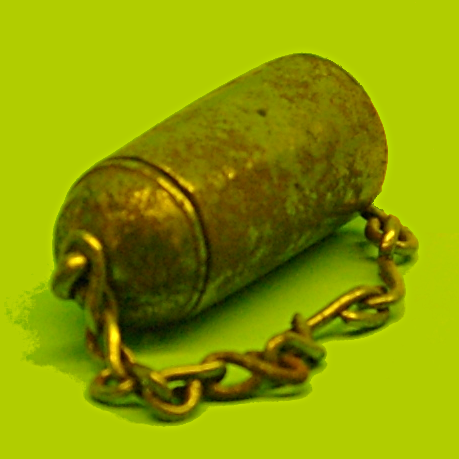 Skörtunna för transport av glöd. Antik.